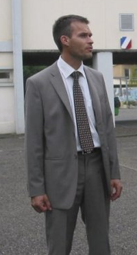 Photo du proviseur actuel du lycée Paul Valéry de Meknès.